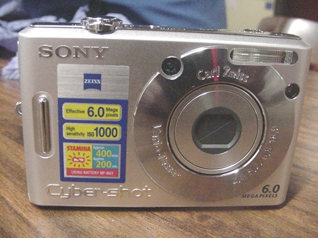 Apareil photographique numérique Sony Cyber-shot DSC-W30